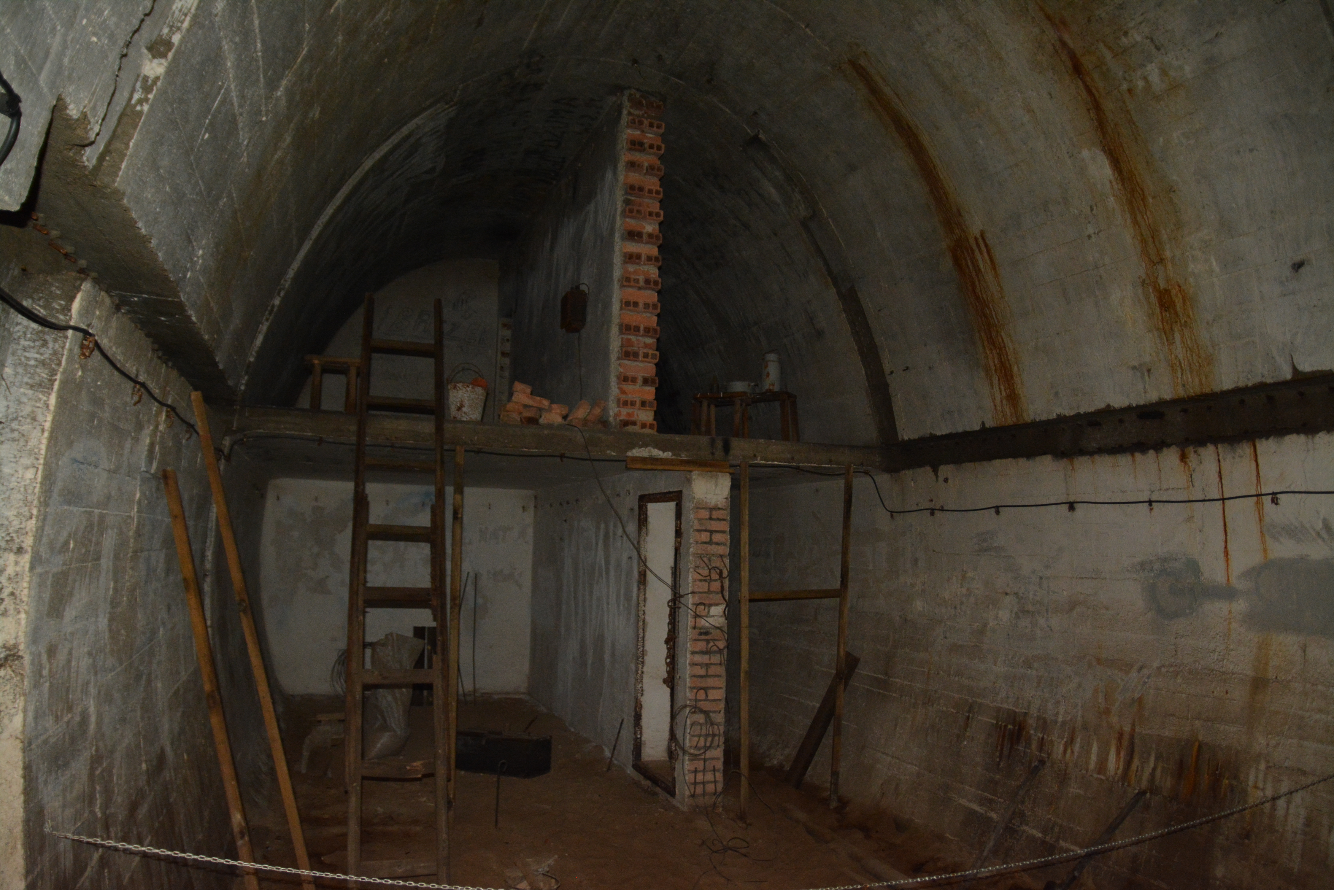 MRU - Muzeum Fortyfikacji i Nietoperzy w Pniewie